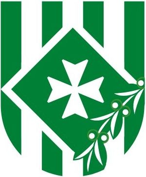 Escut d'Horta de Pimpí, amb els simbols mes importants del territori.